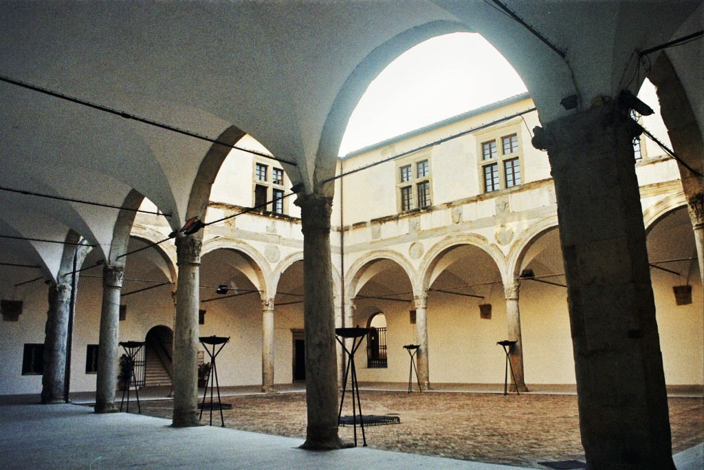 Il Palazzo Ducale è un monumento rinascimentale della città di Camerino, nelle Marche. Sede dell'Università degli Studi di Camerino.